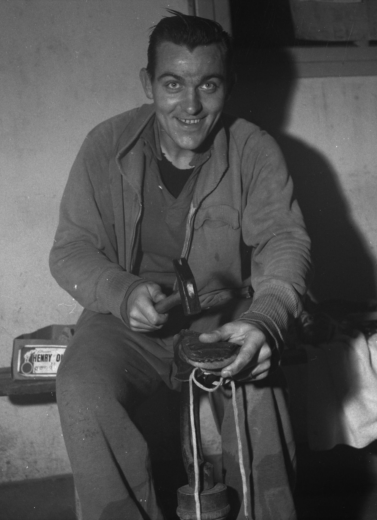 Pas de lieu. 1958-1959. Vue d'Ernest Schultz, joueur du Toulouse Football Club, qui arrange ses crampons de chaussures.